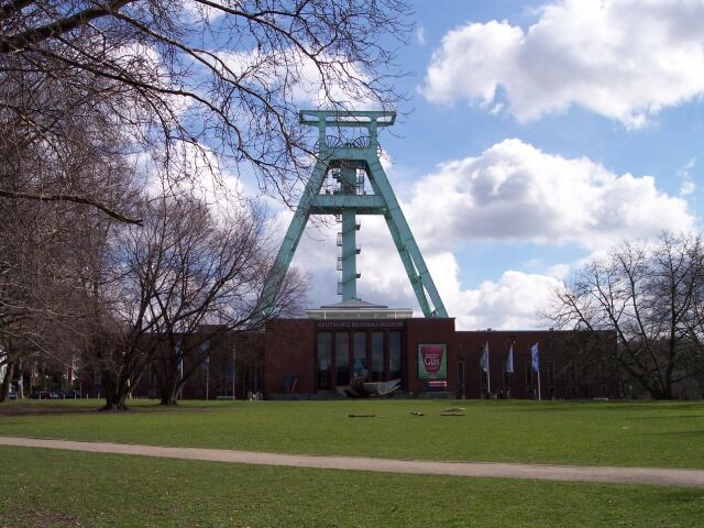 Bild aus Bochum, selbst aufgenommen, GFDL